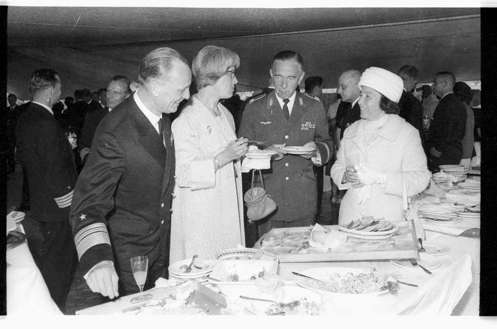 an der Tirpitzmole. Im Bild der Befehlshaber der Flotte Vizeadmiral Heinrich Gerlach (1.v.l.) und der Kommandeur der 7. Luftwaffendivision (Schleswig) Brigadegeneral Helmut Mahlke (3.v.l.) am Buffet.